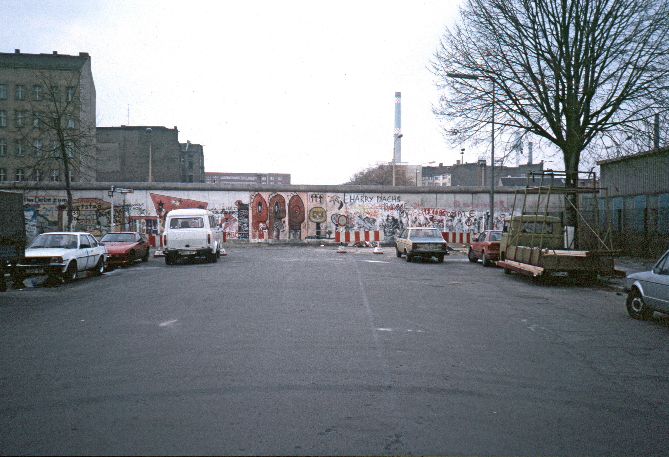 Köpenicker Straße Berlin-Kreuzberg, kurz vor der Berliner Mauer am Bethaniendamm